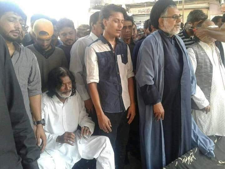 سلمان اعظمی کے والد ریحان اعظمی، سلمان اعظمی کی تدفین کے بعد غمگین بیٹھے ہیں۔